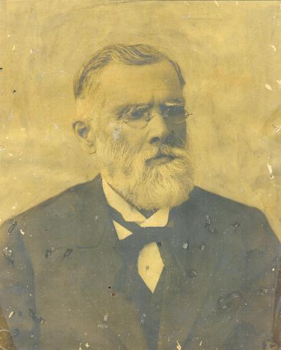 Desmbargador Coriolano Augusto de Loyola.